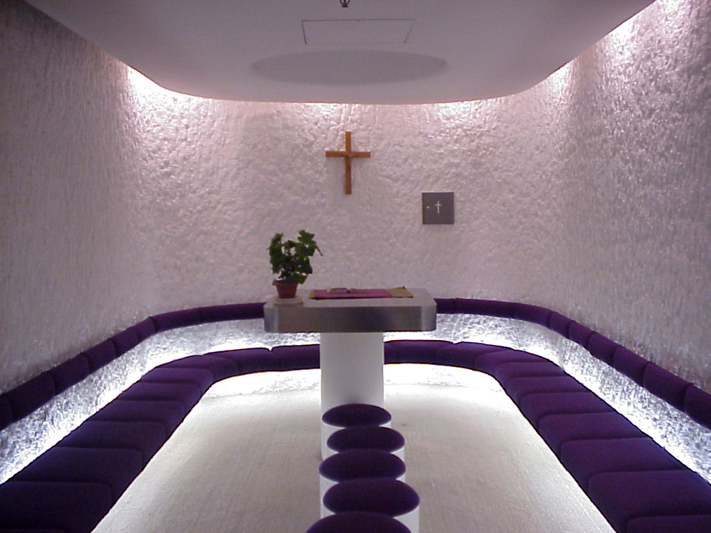 Chapelle catholique de l'aéroport Roissy Charles-de-Gaulle.